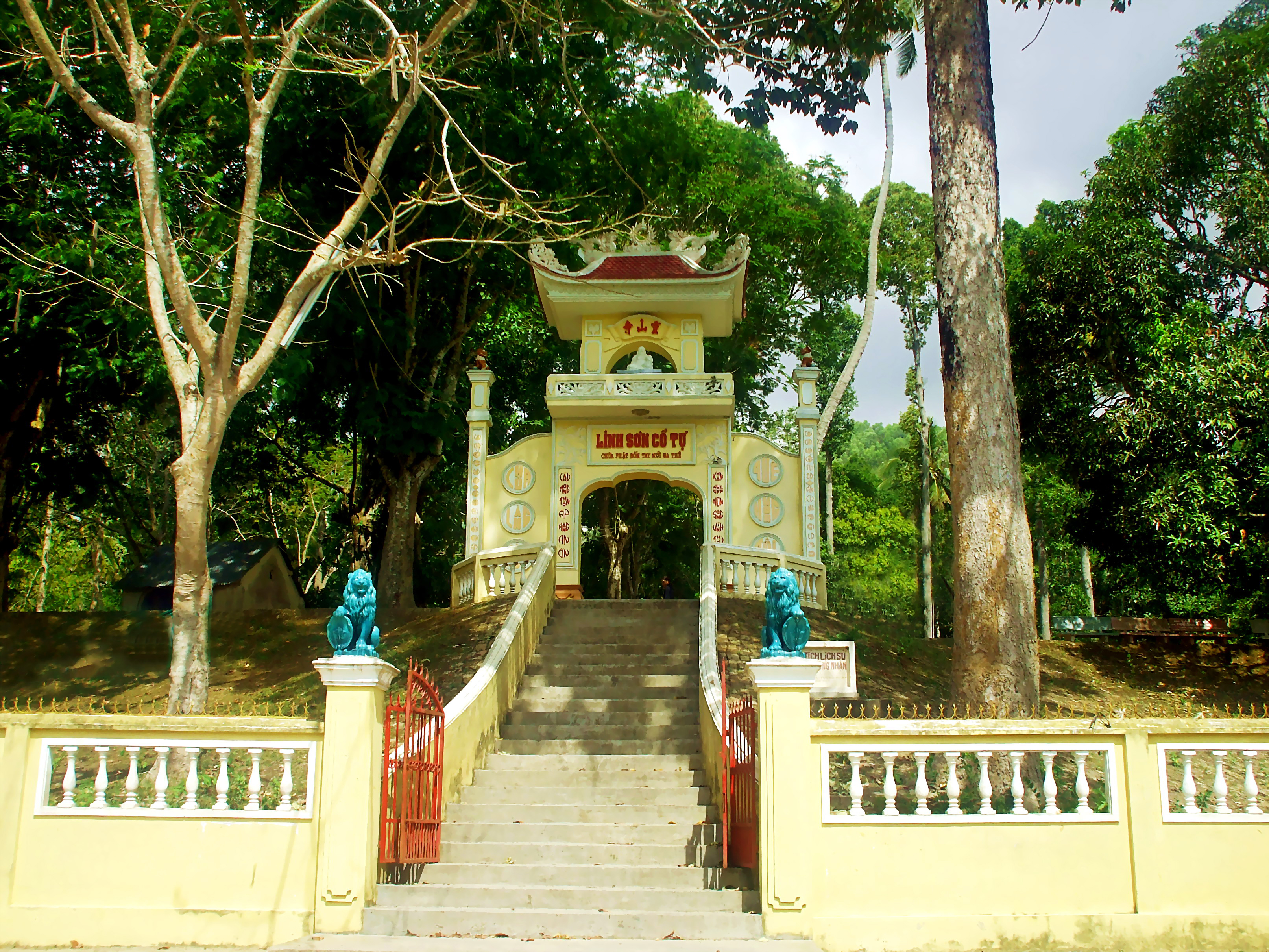 Chùa cổ Linh Sơn tọa lạc tại chân núi Ba Thê, thuộc thị trấn Óc Eo, huyện Thoại Sơn, tỉnh An Giang, Việt Nam.